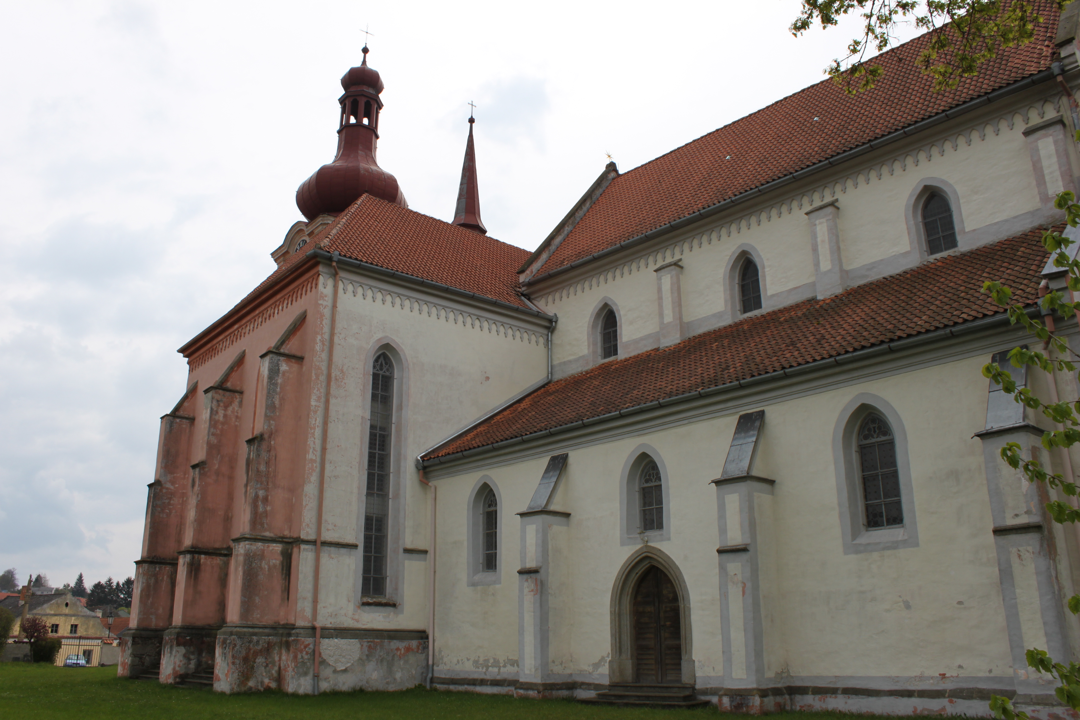 Kostel sv. Jakuba v Nepomuku, pohled na severní fasádu